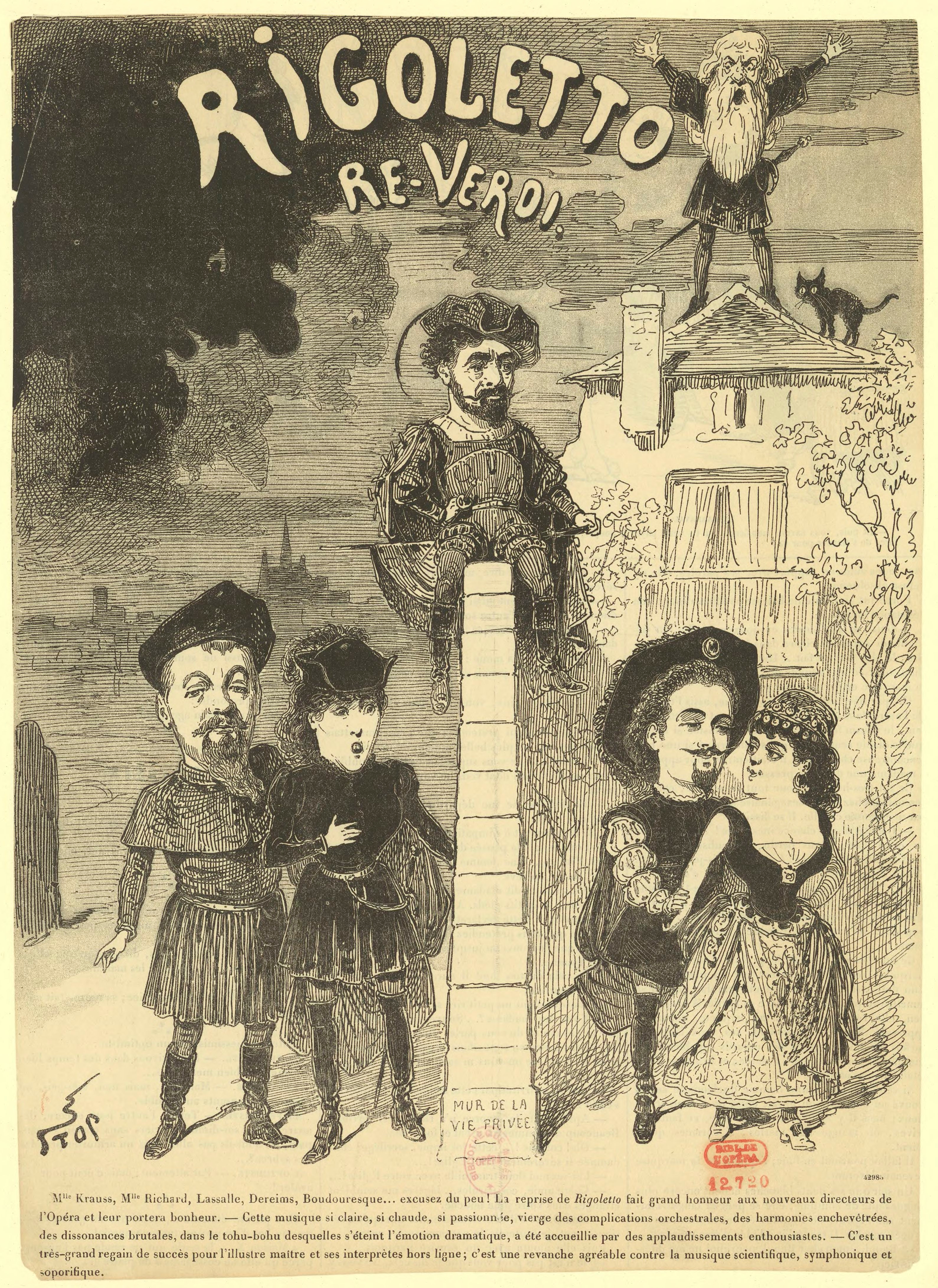 Gravure humoristique Rigoletto re-Versi. Dessin de Stop, 1885. De gauche à droite : Jean Lassalle, Gabrielle Krauss, Auguste Boudouresque, Étienne Dereims et Renée Richard. Bibliothèque de l'opéra de Paris/ BnF